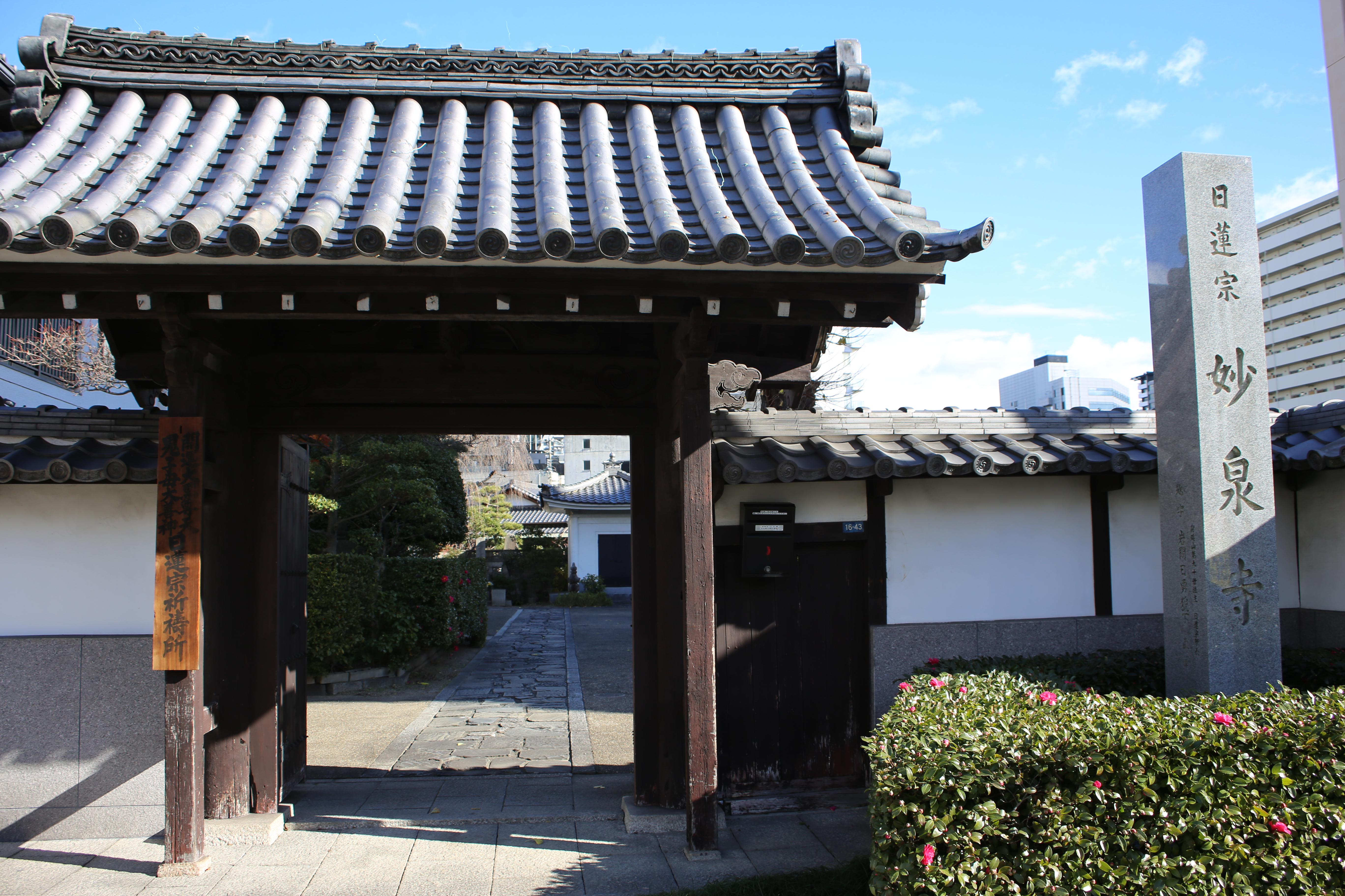 名古屋市東区東桜の妙泉寺